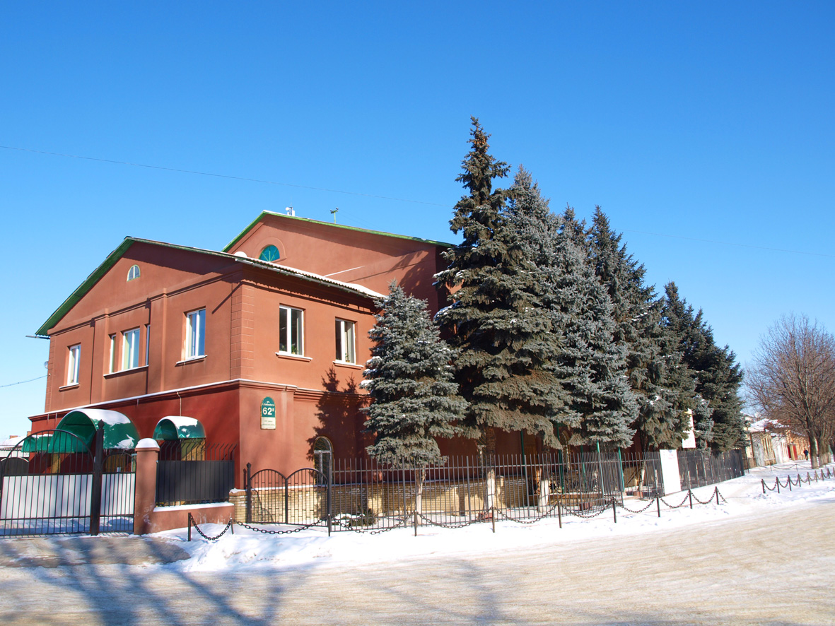 Остатки Троицкого монастыря в Луганске (нач.ХХ в.)(сохранился лишь первый этаж).